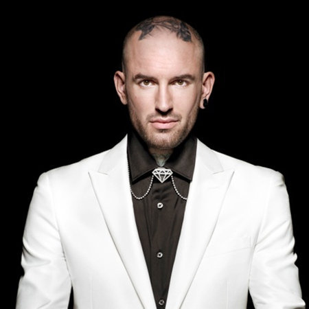 Ben Tattoo Saunders is een Nederlandse zanger.